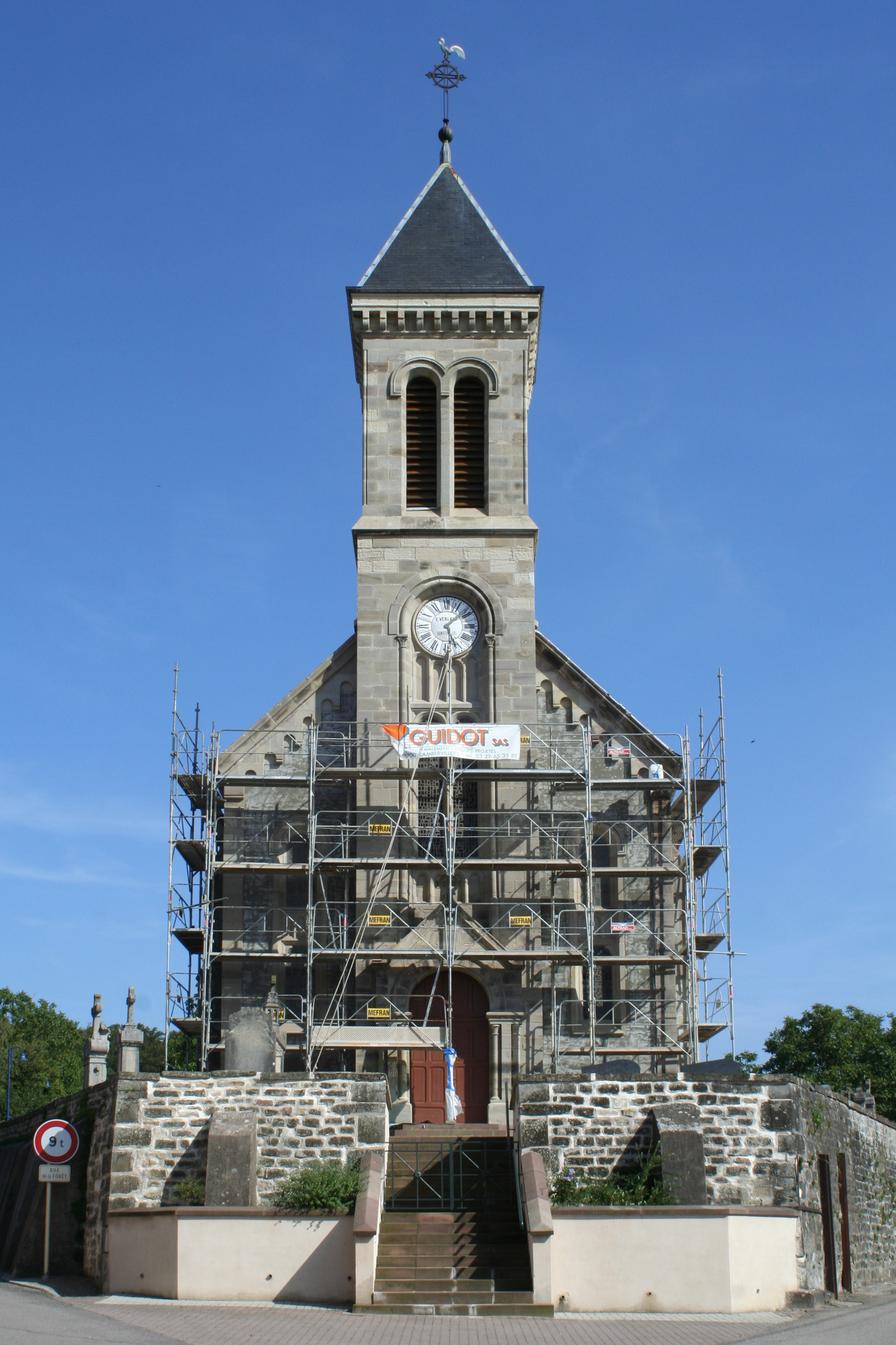 Facade occidentale de l'église Saint-Gorgon de Saint-Gorgon (Vosges)